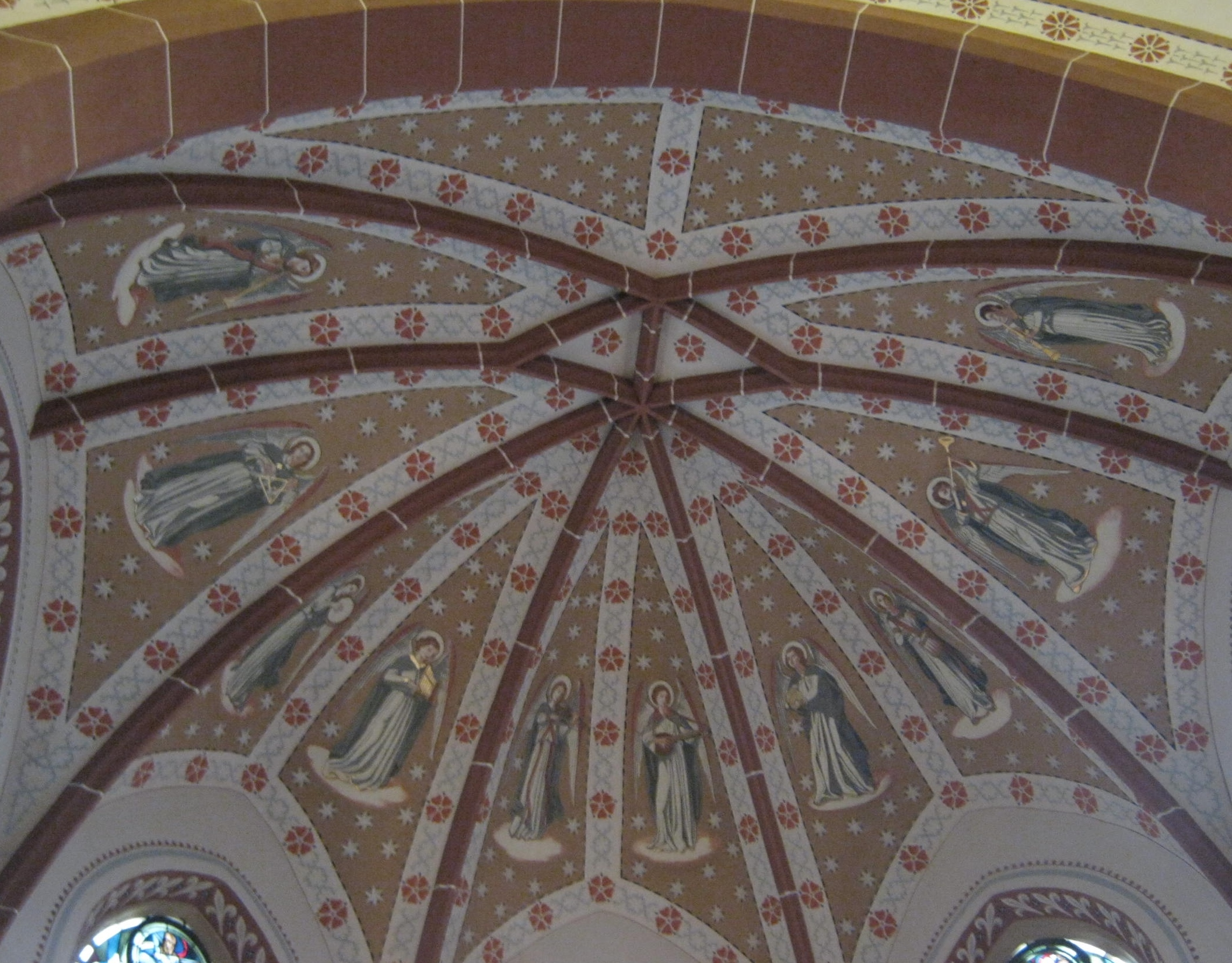 Deckenmalerei im Altarchor